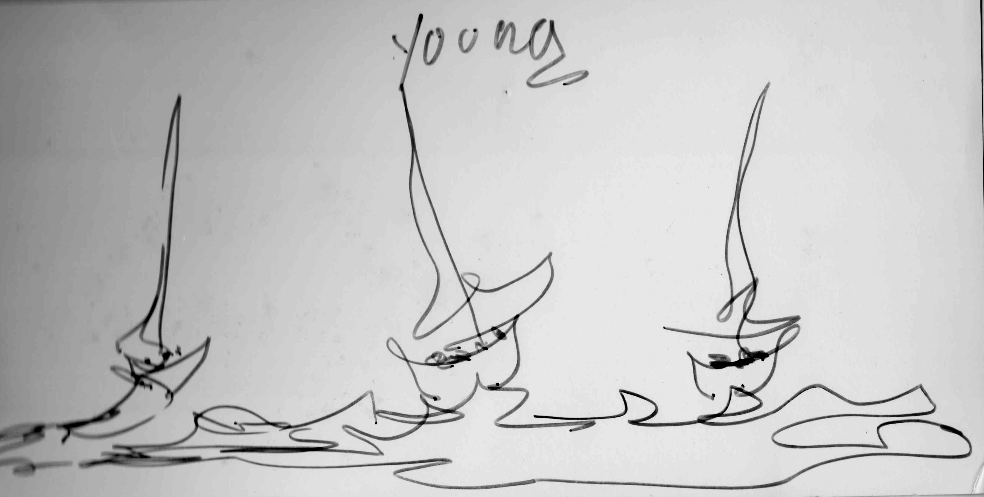 February 2003, the Miami art museum held a birthday party for Purvis Young (he was 60) who kindly drew for each person who attended the party on the white side of the party fliers. This is mine.